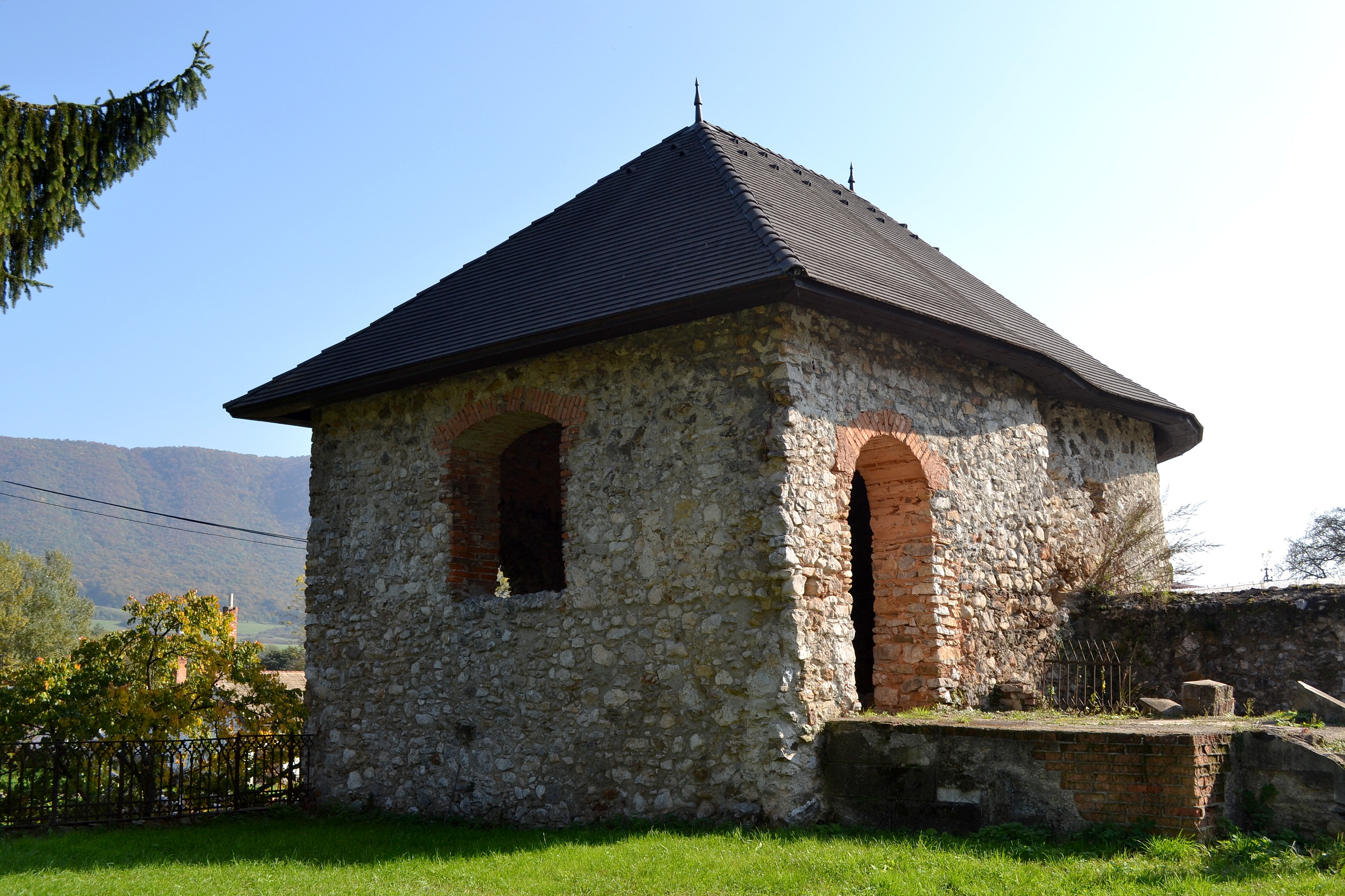 Strážna bašta vodného hradu